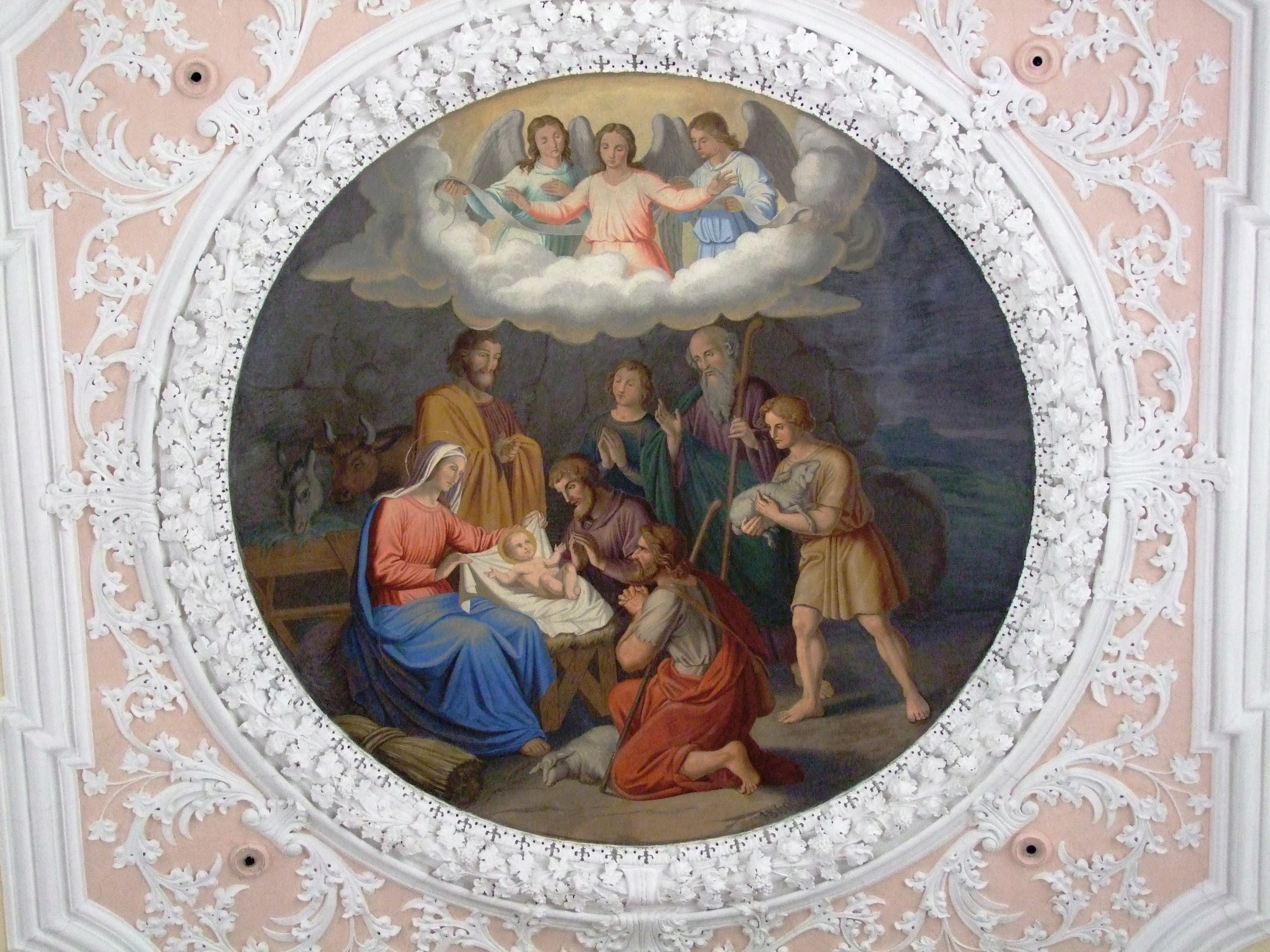 St. Martin im oberschwäbischen Boos bei Memmingen.